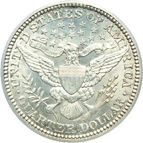 1913 Quarter Dollar, Barber, Reverse